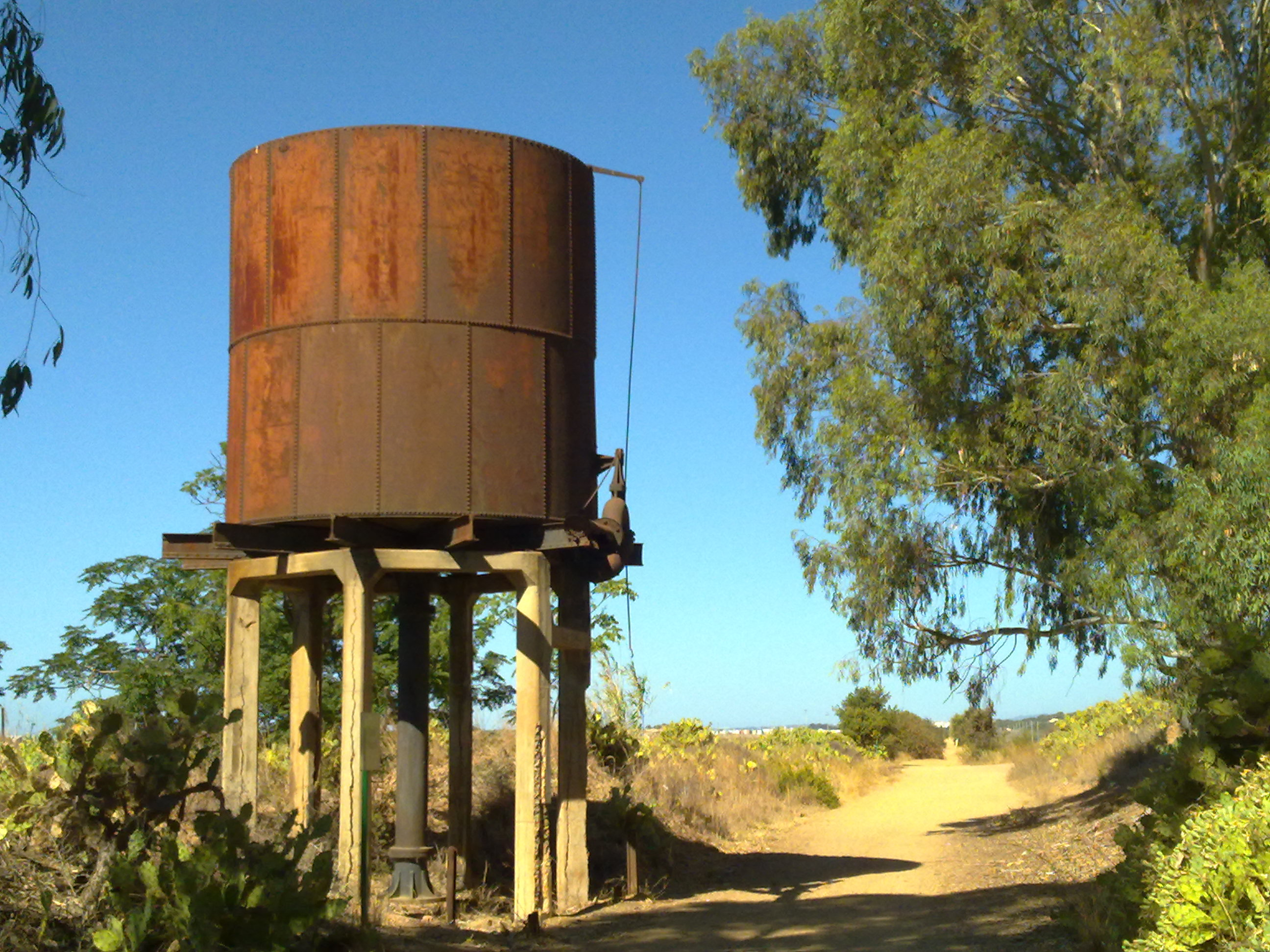 Antiguo depósito de agua para las locomotoras de vapor de la línea de ferrocarril Gibraleón-Ayamonte, a la salida de la estación de Isla Cristina